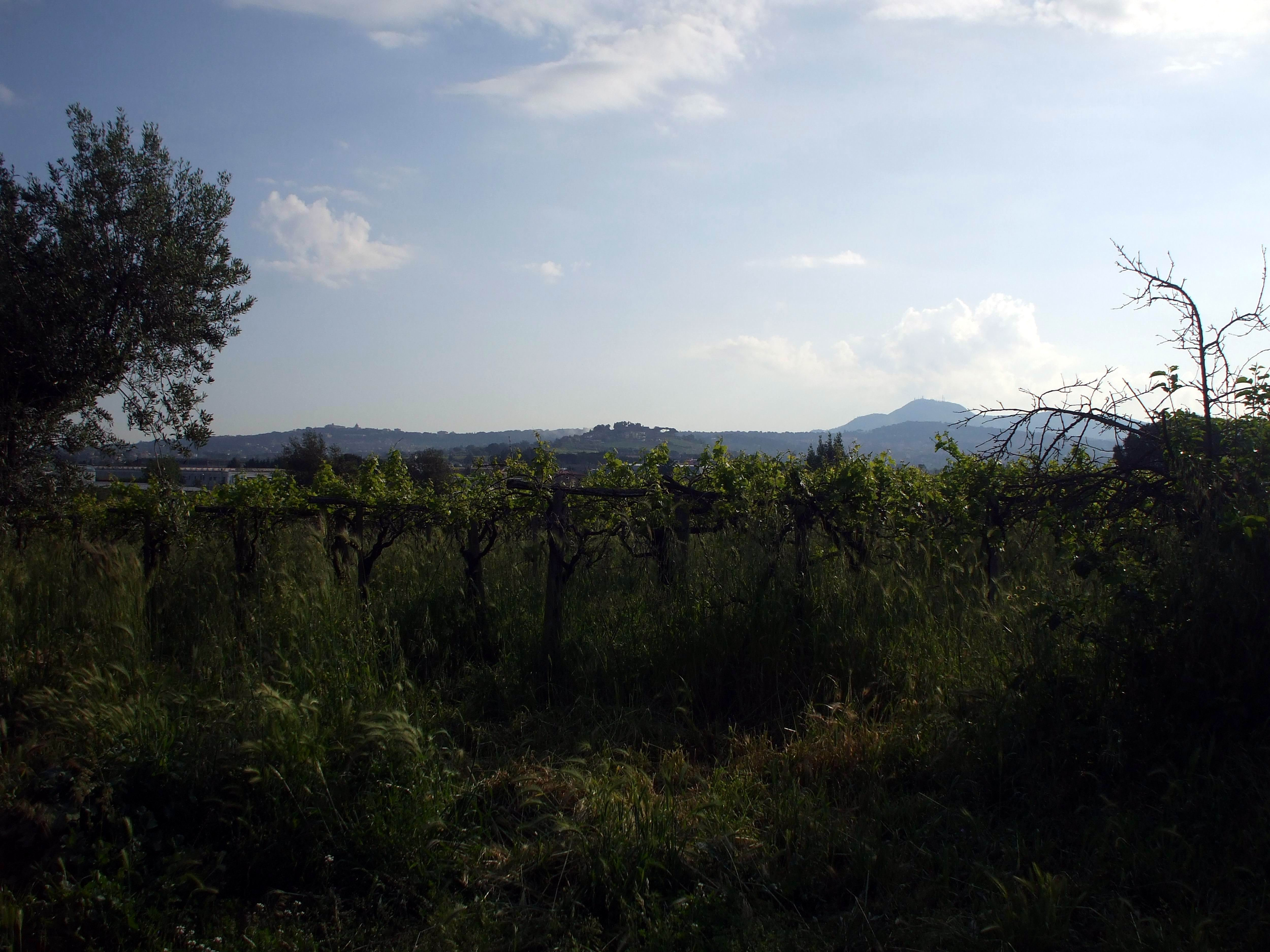 Cecchina di A.L. - panorama campagna con Monte Savello e Monte Cavo